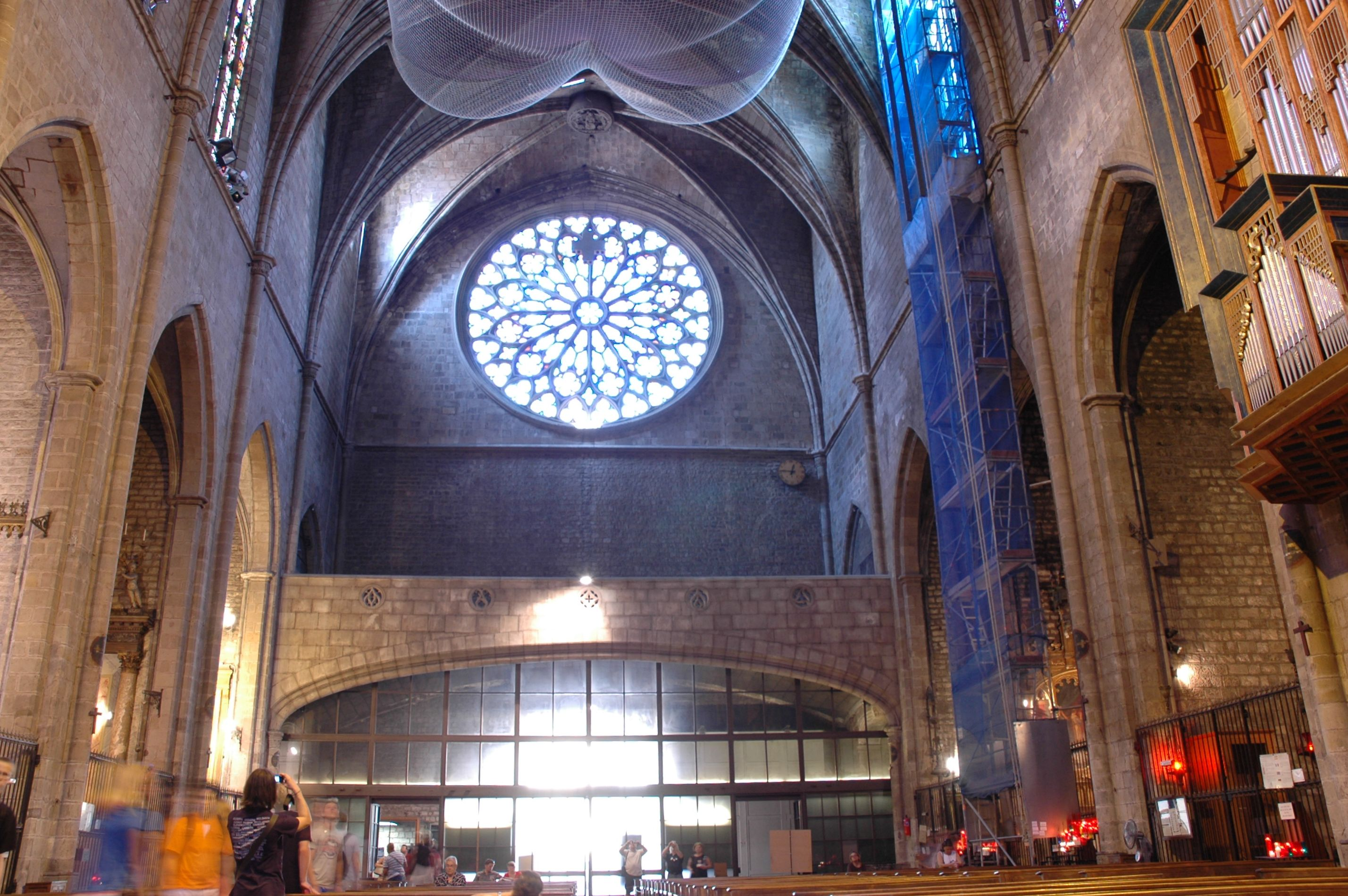 Santa Maria del Pi - Rosassa